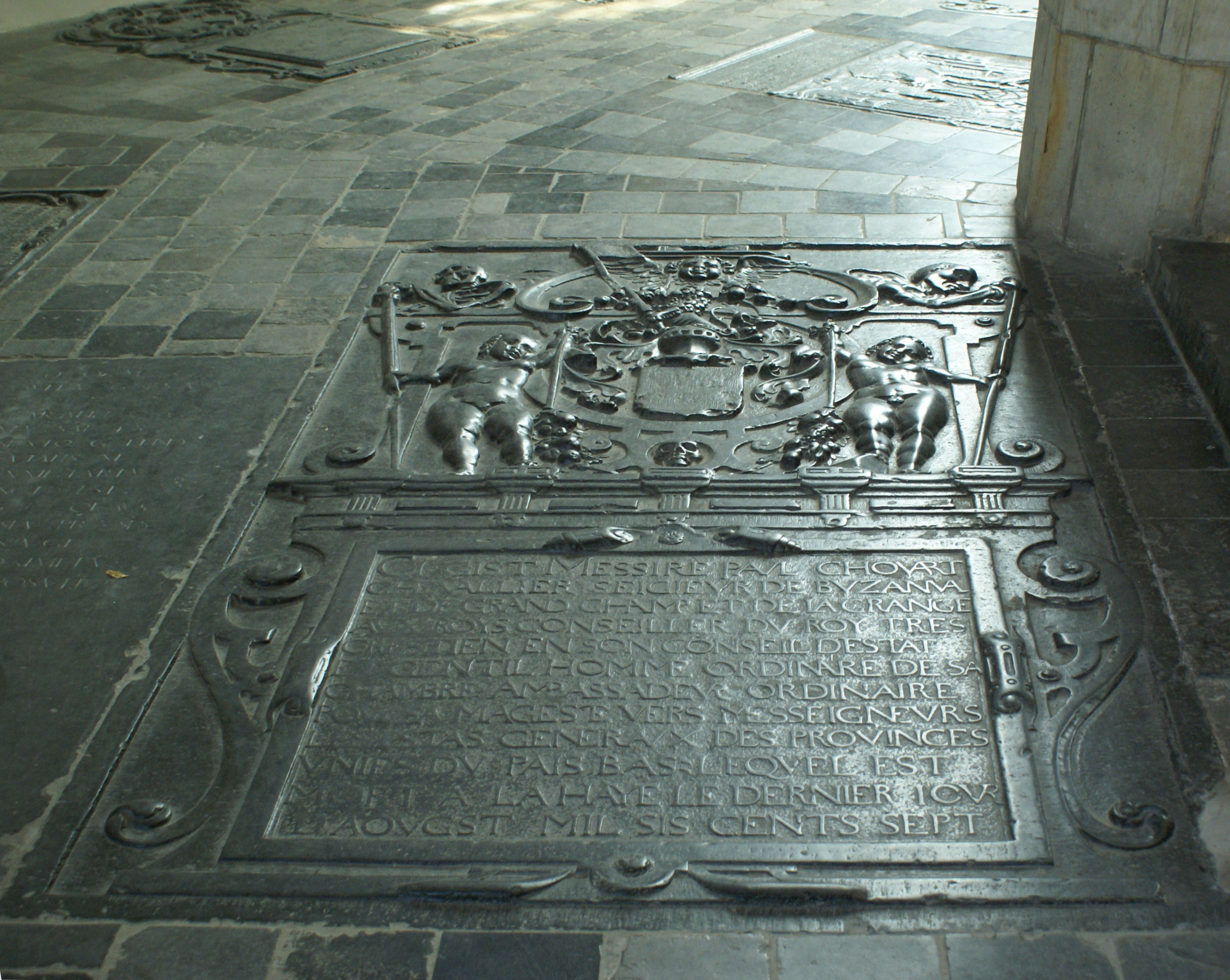 Grafsteen van Paul Chovaert